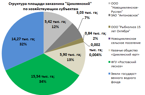 Структура площади государственного заказника Цимлянские пески по хозяйствующим субъектам